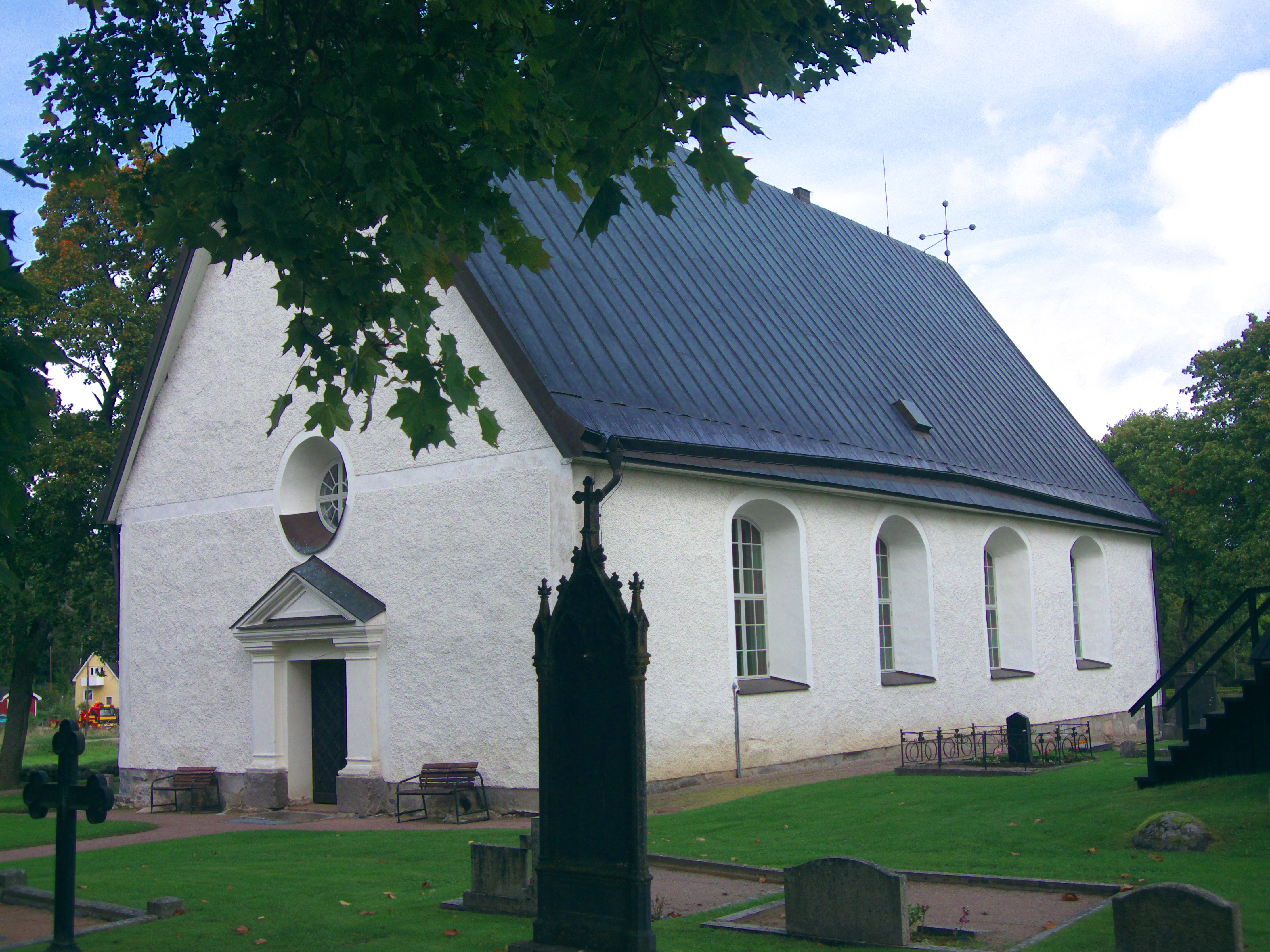 Bergs kyrka, Västerås stift